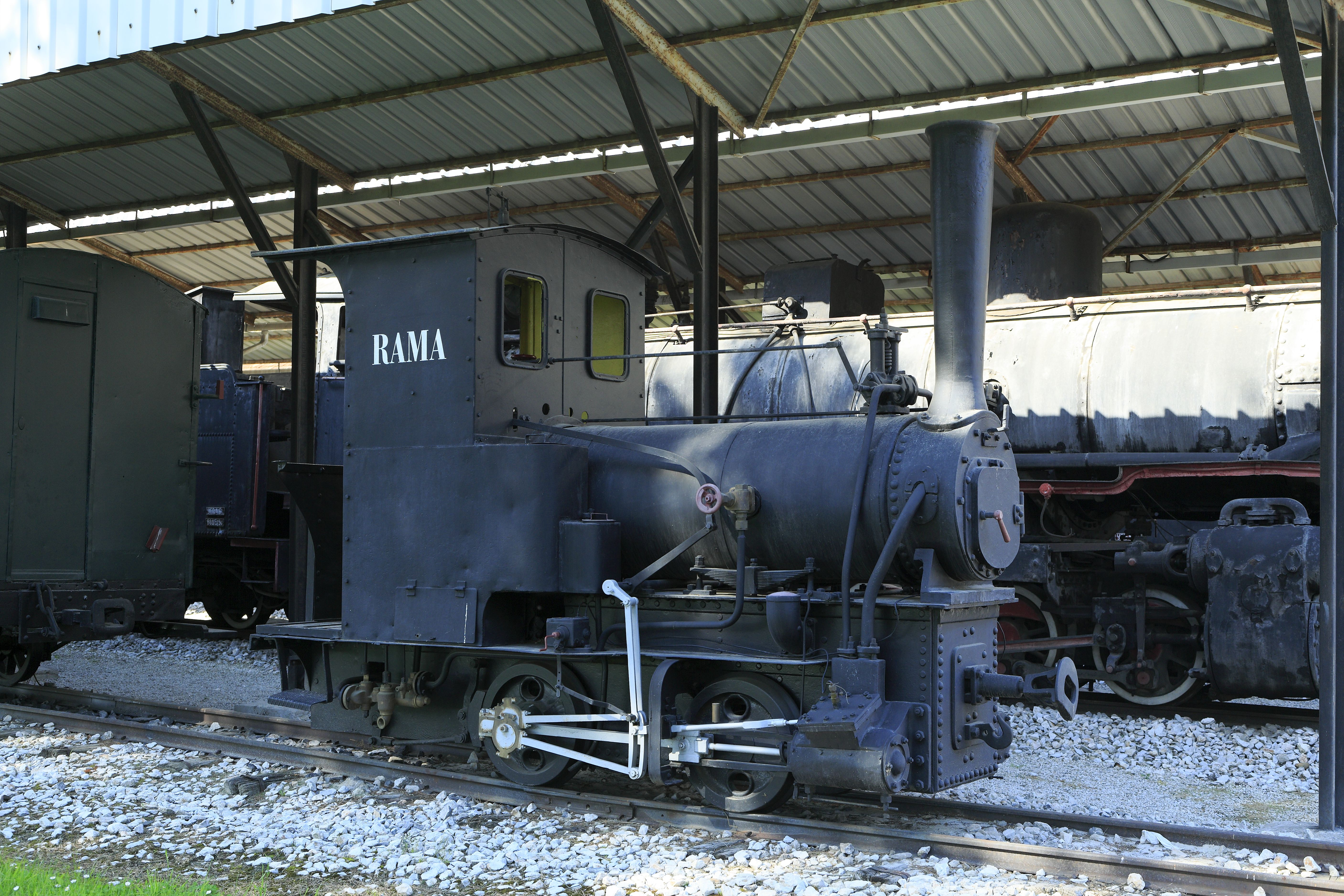 Die kleine Nassdampfmaschine ist eine typische Baulokomotive. Der Rahmen enthält den Wasserkasten, die Brennstoffvorräte sind jedoch bescheiden.